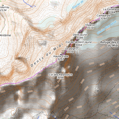 carte réalisée sur umap This map may be incomplete, and may contain errors. Don't rely solely on it for navigation.